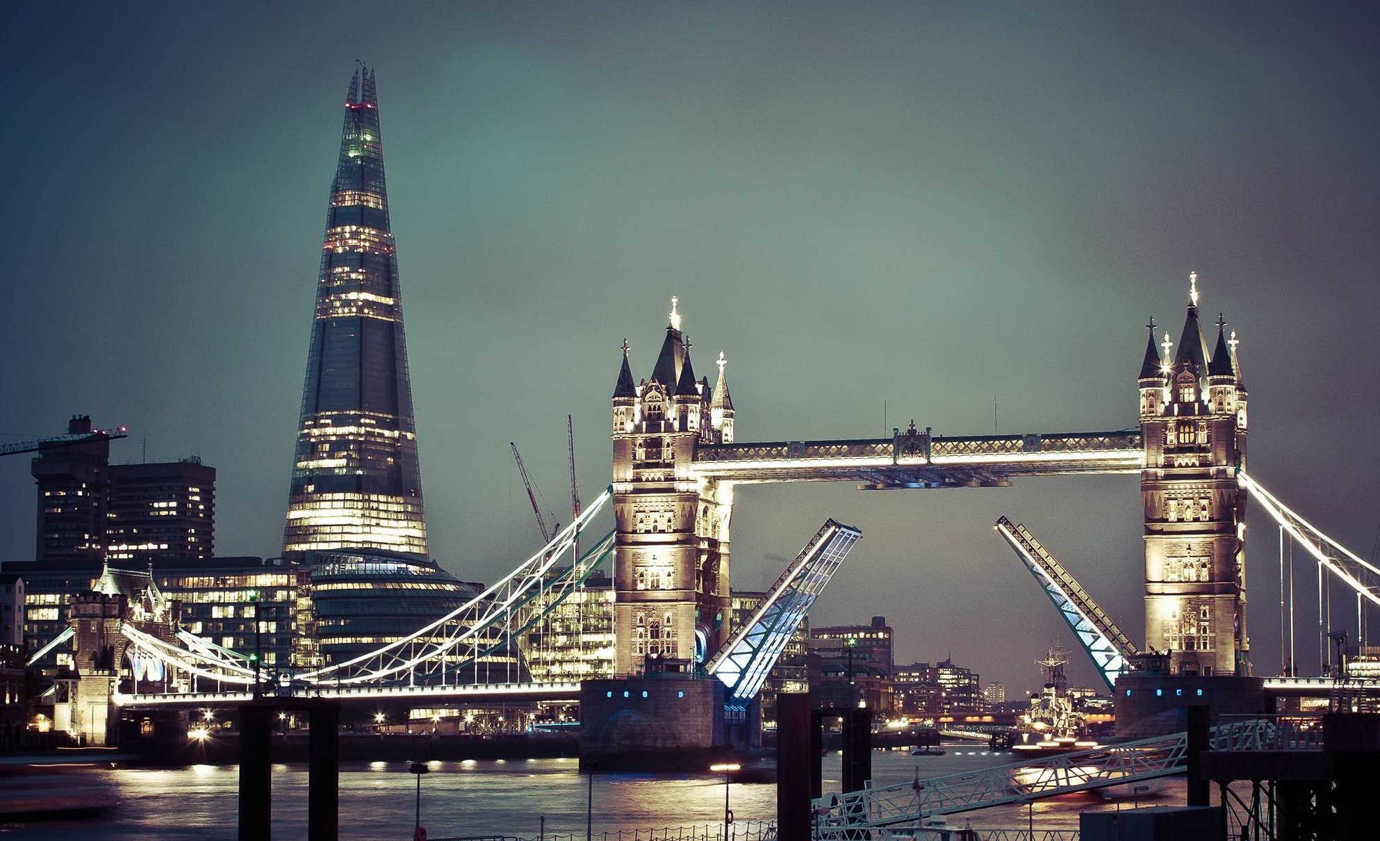 Português do Brasil: Torre, arranha-céu, londres